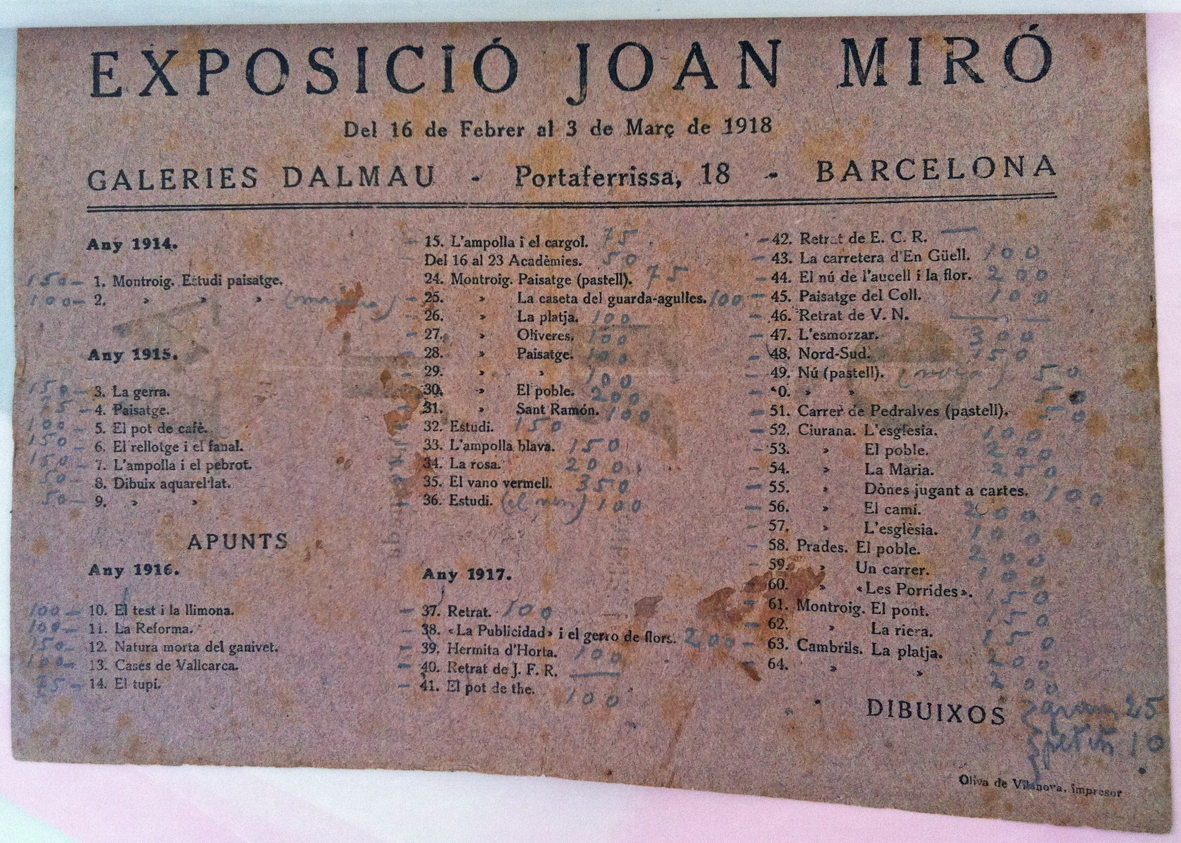 Catàleg de la Primera exposició Joan Miró Galeries Dalmau el 1918